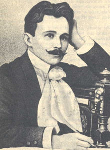 Василий Николаевич Пачовский (1878—1942) — галицко-украинский поэт-модернист